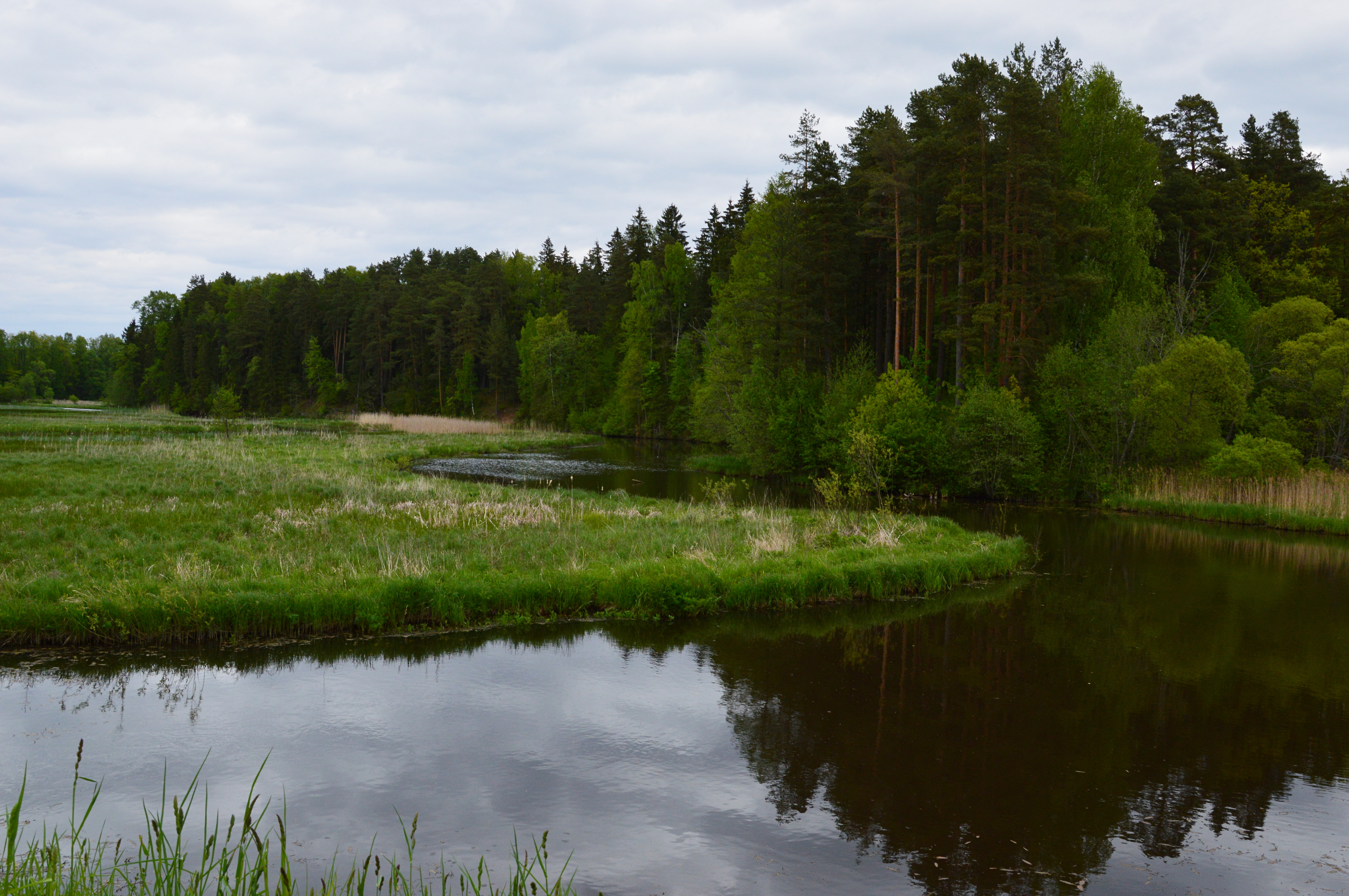 Võhandu jõgi, Nulga küla, Räpina vald, Põlva maakond.